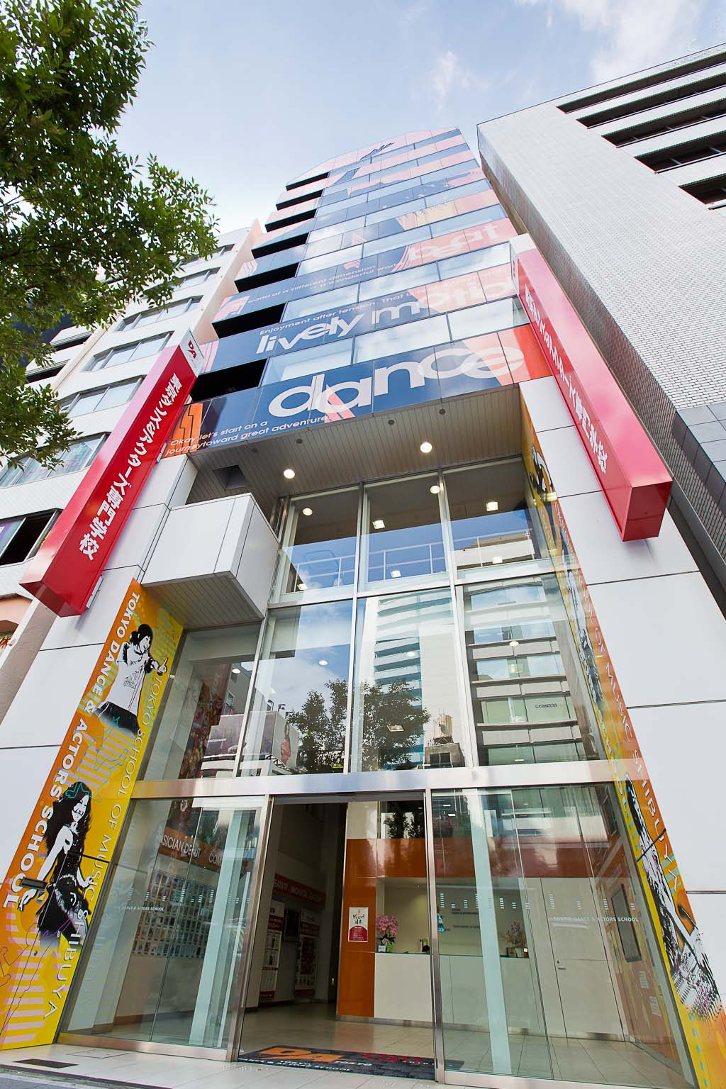 東京ダンス＆アクターズ専門学校 総合校舎